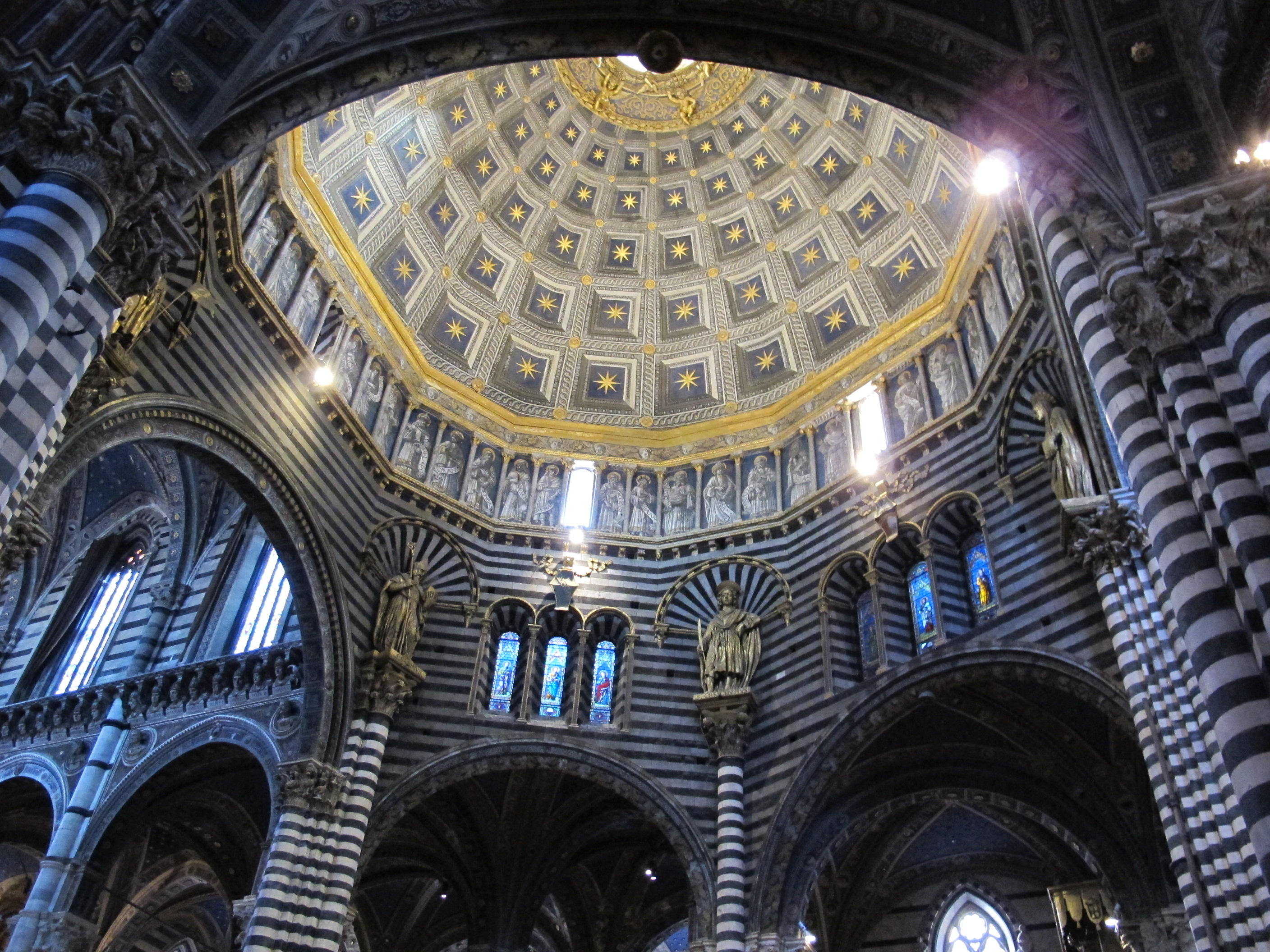 Duomo di siena, cupola, interno